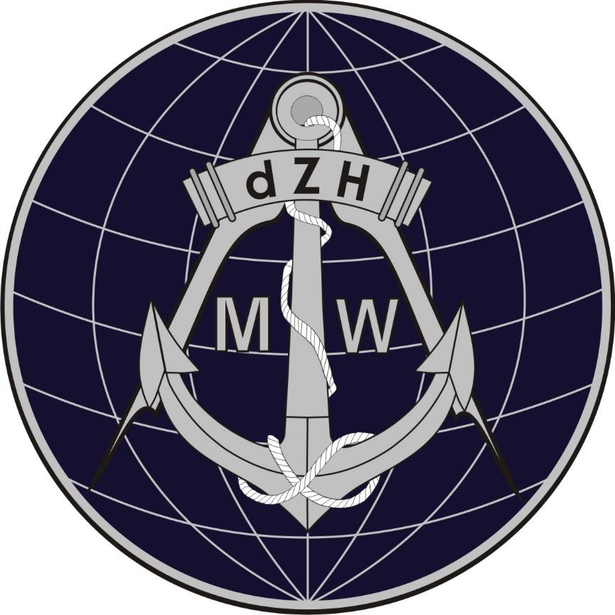 Dywizjon Zabezpieczenia Hydrograficznego Marynarki Wojennej – oznaka rozpoznawcza na mundur polowy – 2019, Polska.